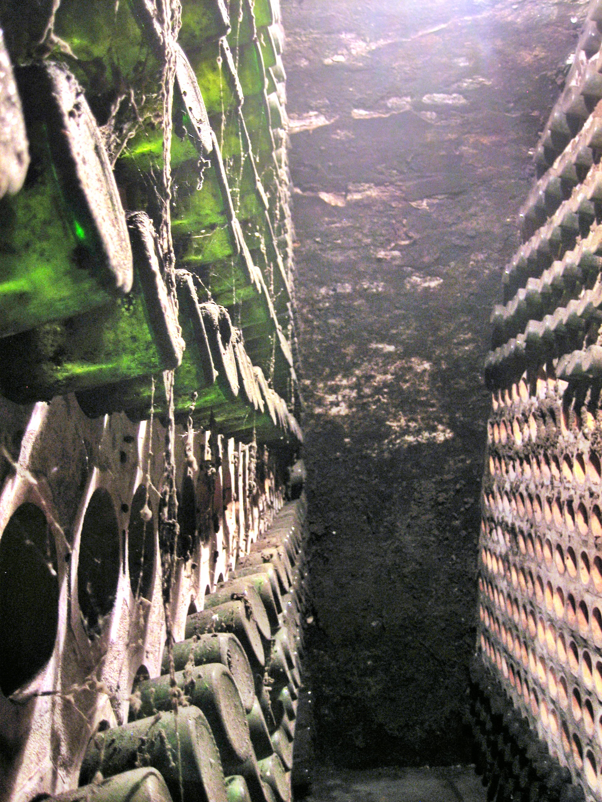 Enologic collection in the Cellar of "Belje", co. in Kneževi Vinogradi, Baranja (Croatia) / Enološka zbirka u podrumu „Belje“, d.d. u Kneževim Vinogradima u Baranji